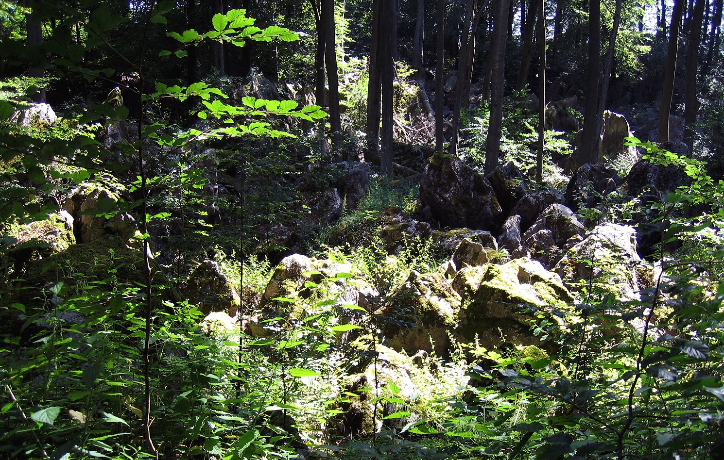 Naturschutzgebiet Felsenmeer in Hemer.